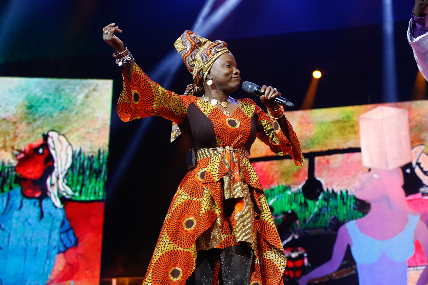 Angelique Kidjo durante o 25o Premio da Musica Brasileira no Theatro Municipal. Foto: Roberto Filho (14/05/14)